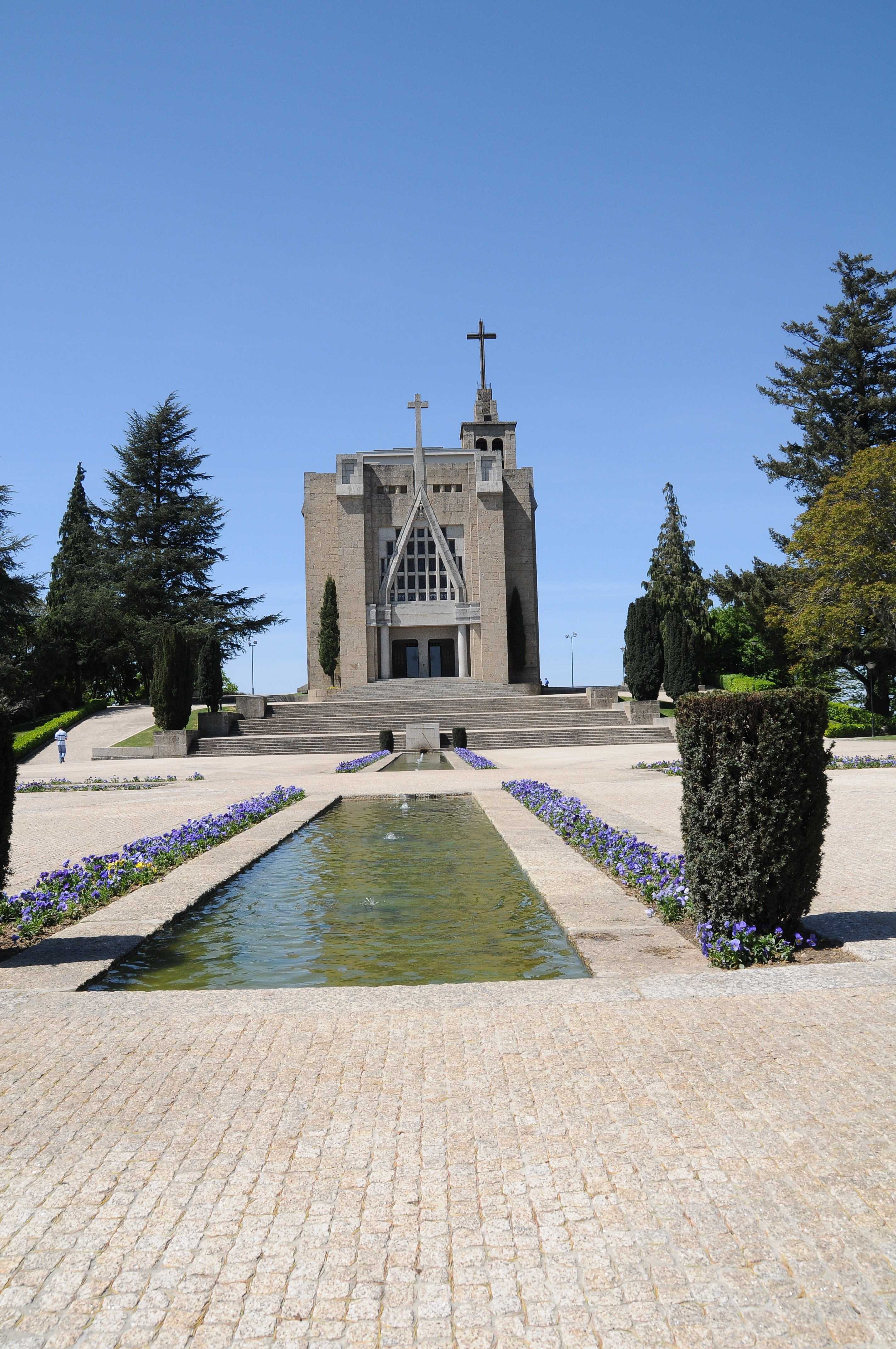 Penha Sanctuary in Guimarães, Portugal.